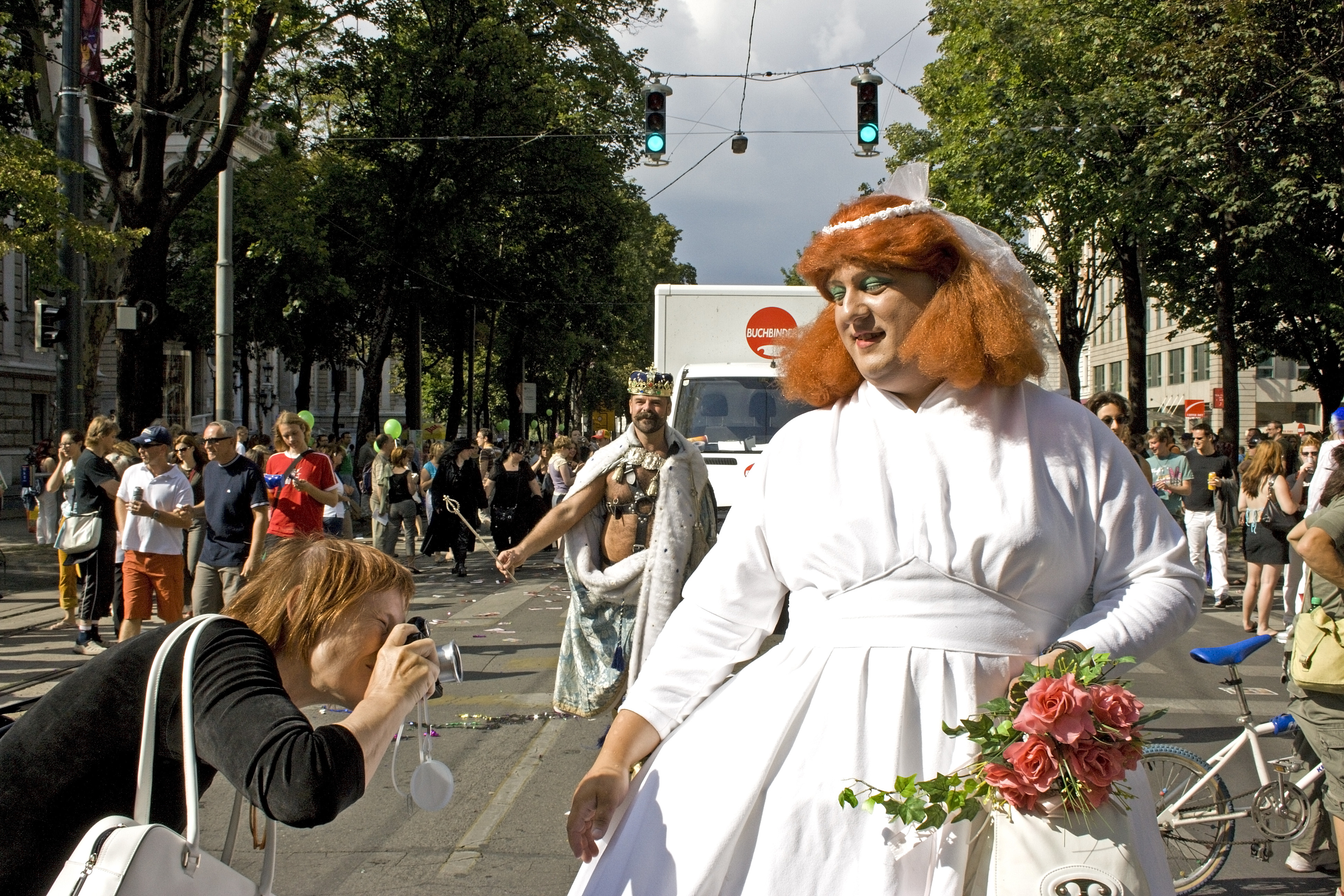 Regenbogenparade 2007, Vienna - Queen of Hearts